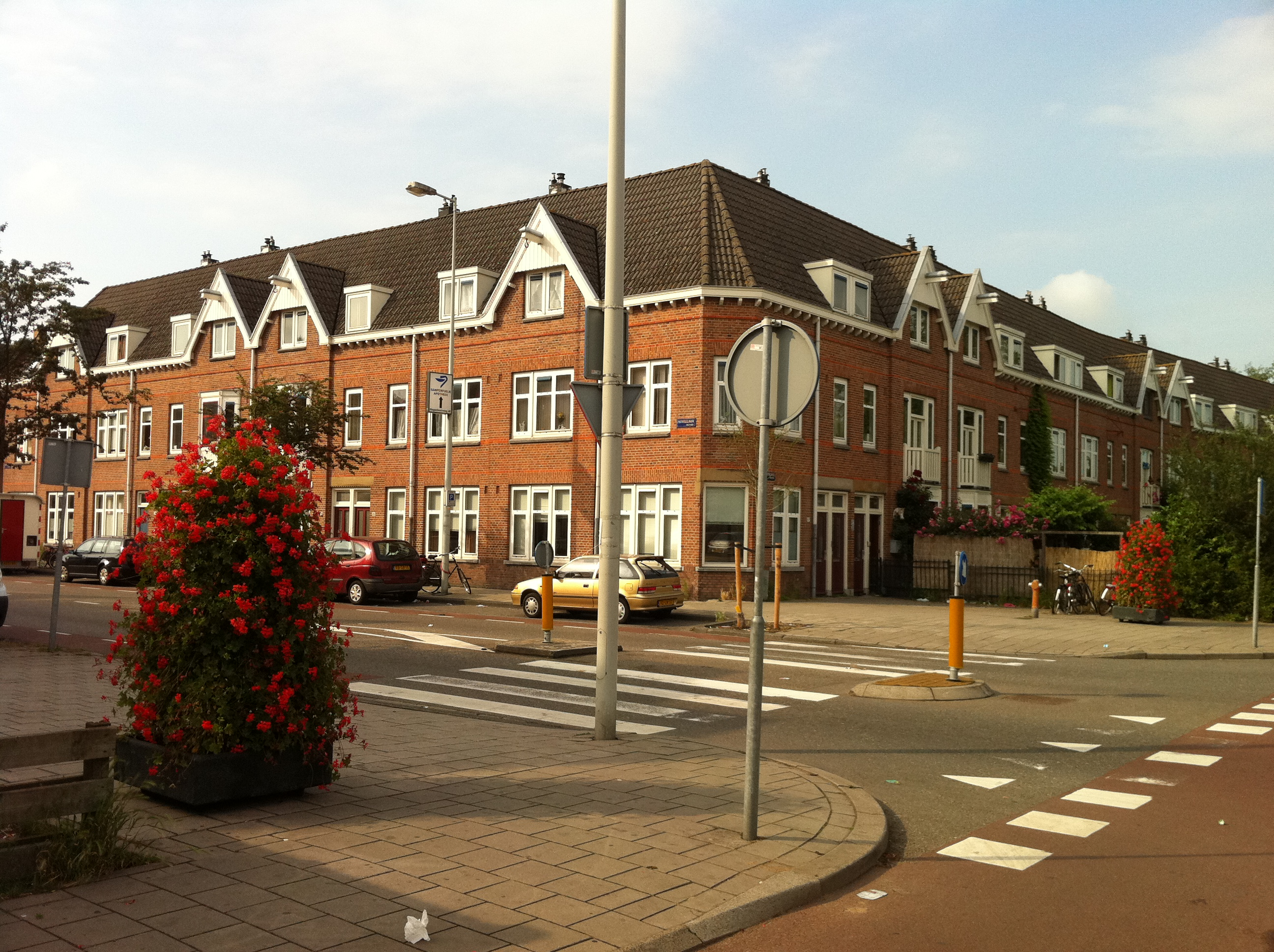 Hoek Havikslaan-Meeuwenlaan, woningblok Maatschappij tot Huizenbouw benoorden het IJ NV, Amsterdam-noord, tegenwoordig deel eigendom Ymere, deels particulier woningbezit